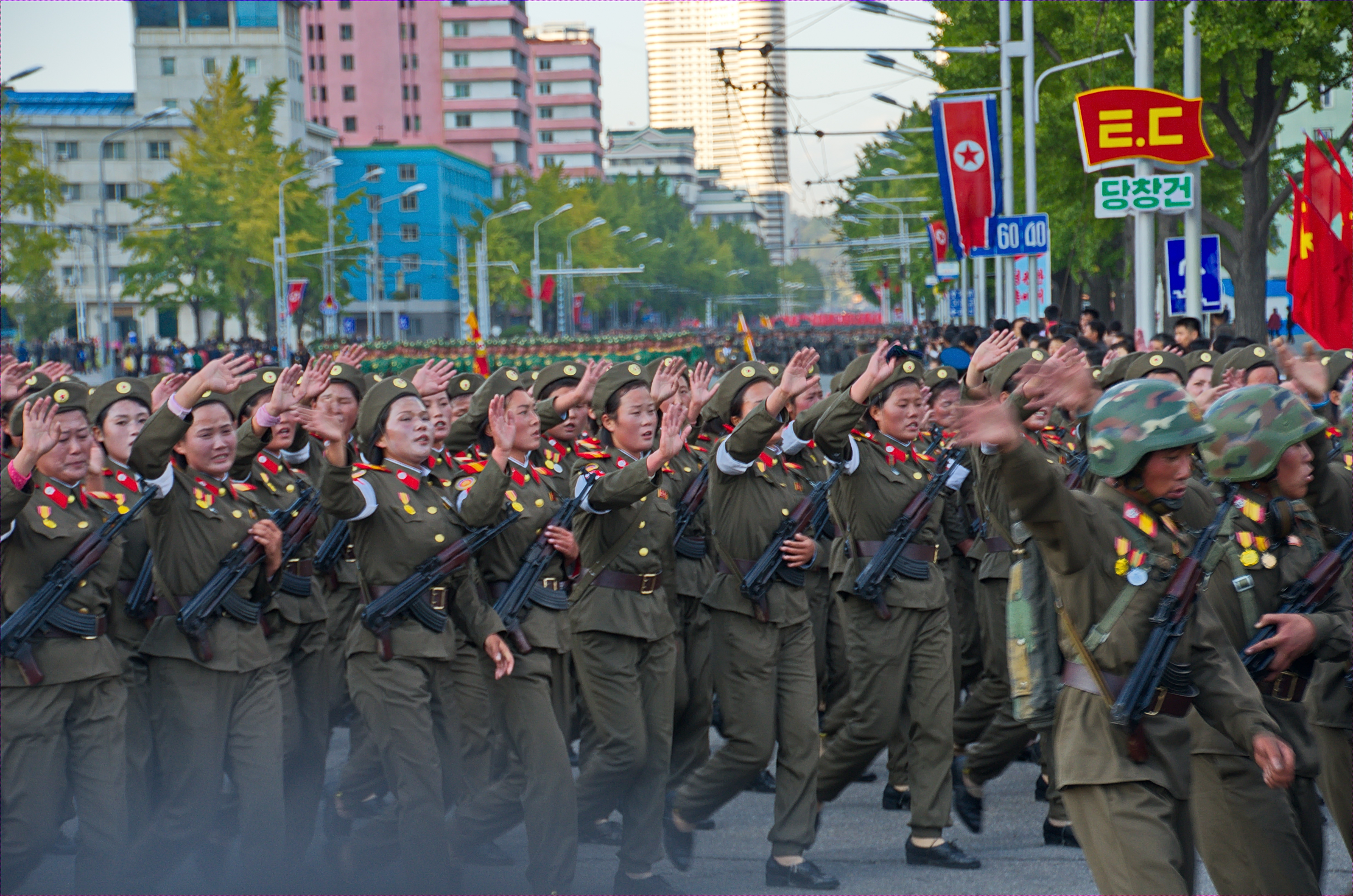 Nordkorea 2015 - Pjöngjang - Parade zum 75. JT der Arbeiterpartei